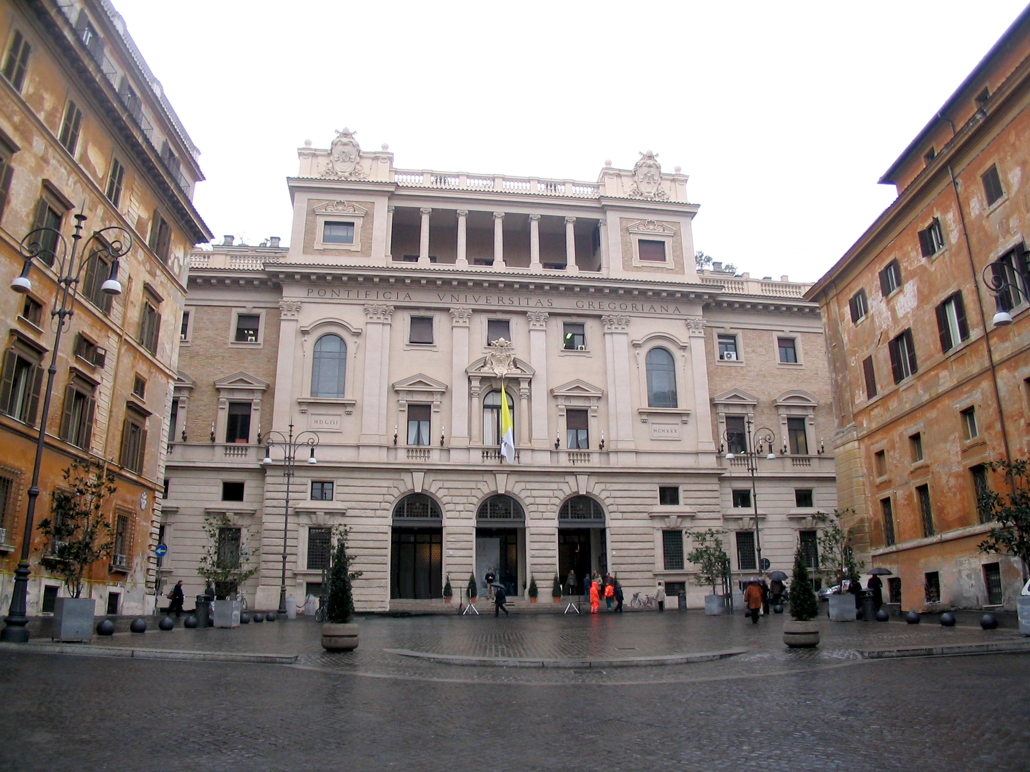 Descrizione: Pontificia Università Gregoriana, Roma, Facciata principale, arch. Giulio Barluzzi, 1930. Fonte: Lavoro personale. Data: 23/02/2006. Autore: Luigi Santoro.